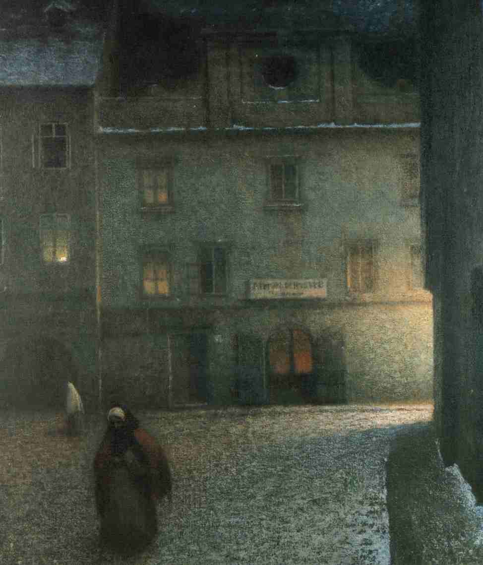 Evening Street